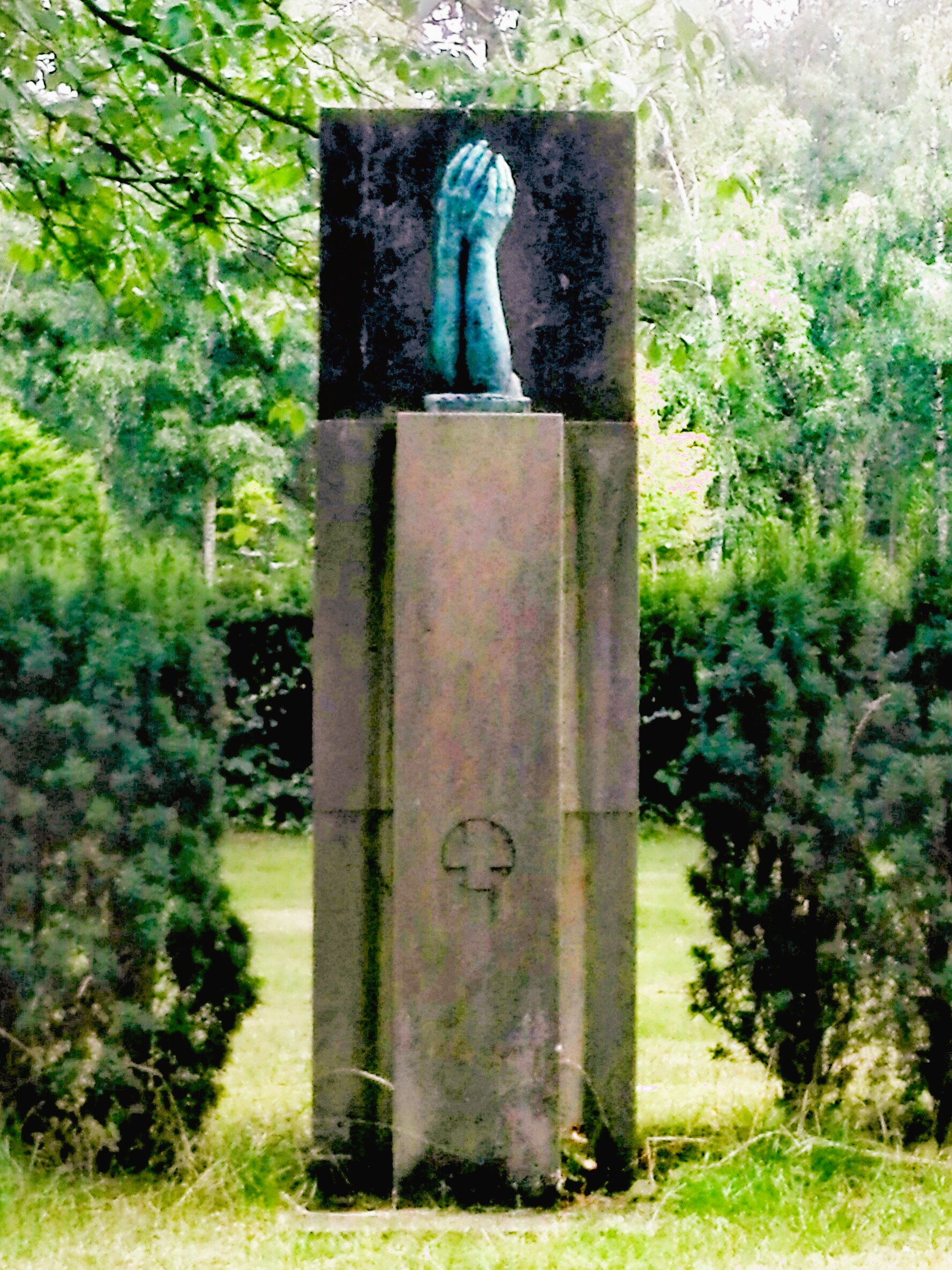 Auf Anregung der Oberin Ottilie Schäfer 1939 erworbenes und aufgestelltes Grabmal der Lübeckischen Schwesternschaft vom Deutschen Roten Kreuz von Georg Kolbe.